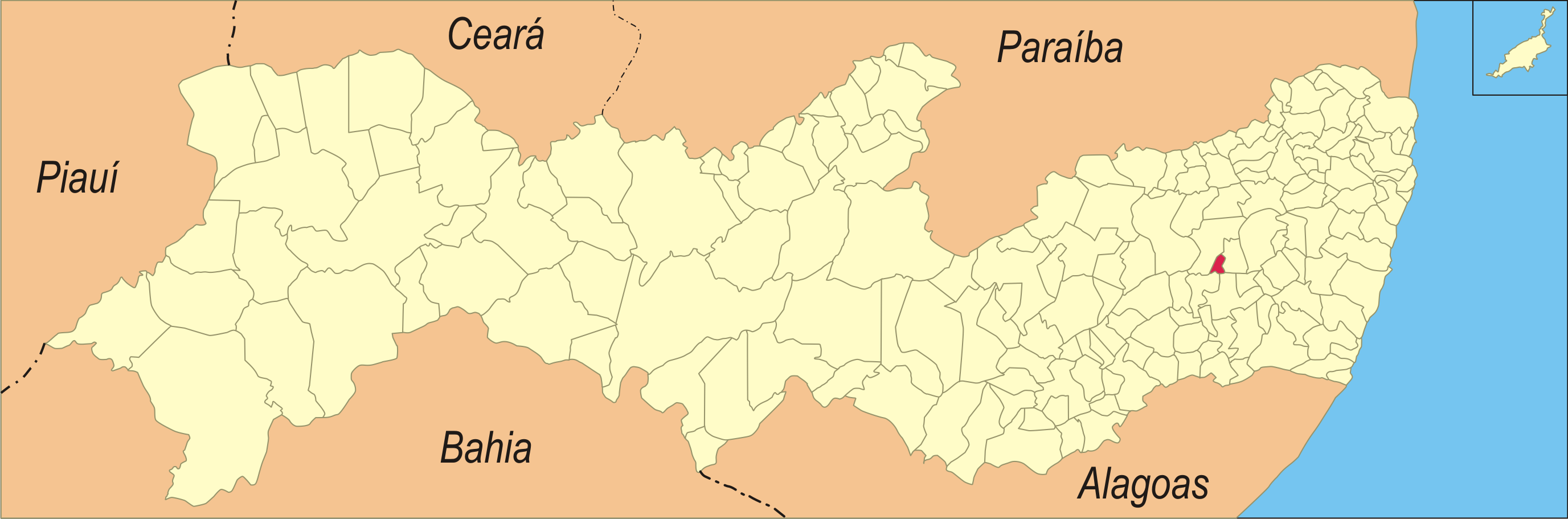 Localização da cidade em Pernambuco.